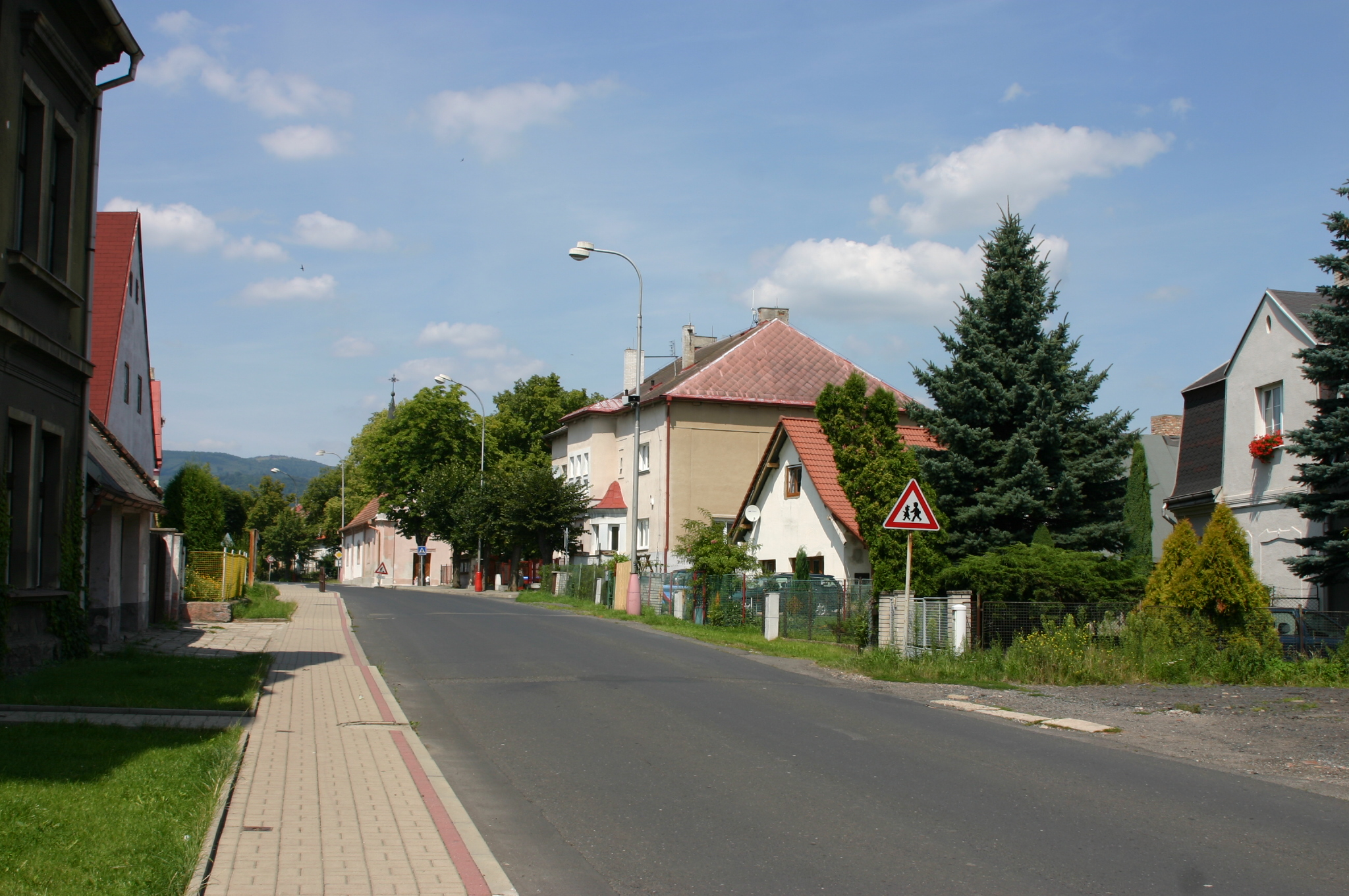 Hlavní ulice v obci Louka v okrese Most.